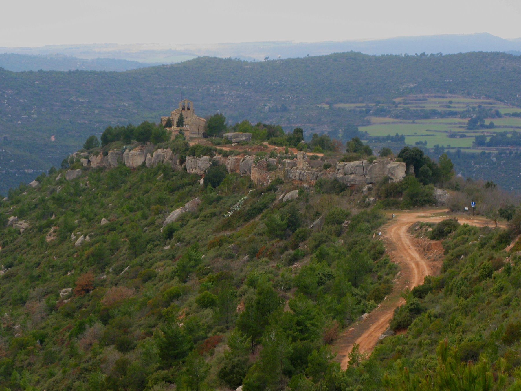 Sta. Cecília de Grevalosa - Castellfollit del Boix